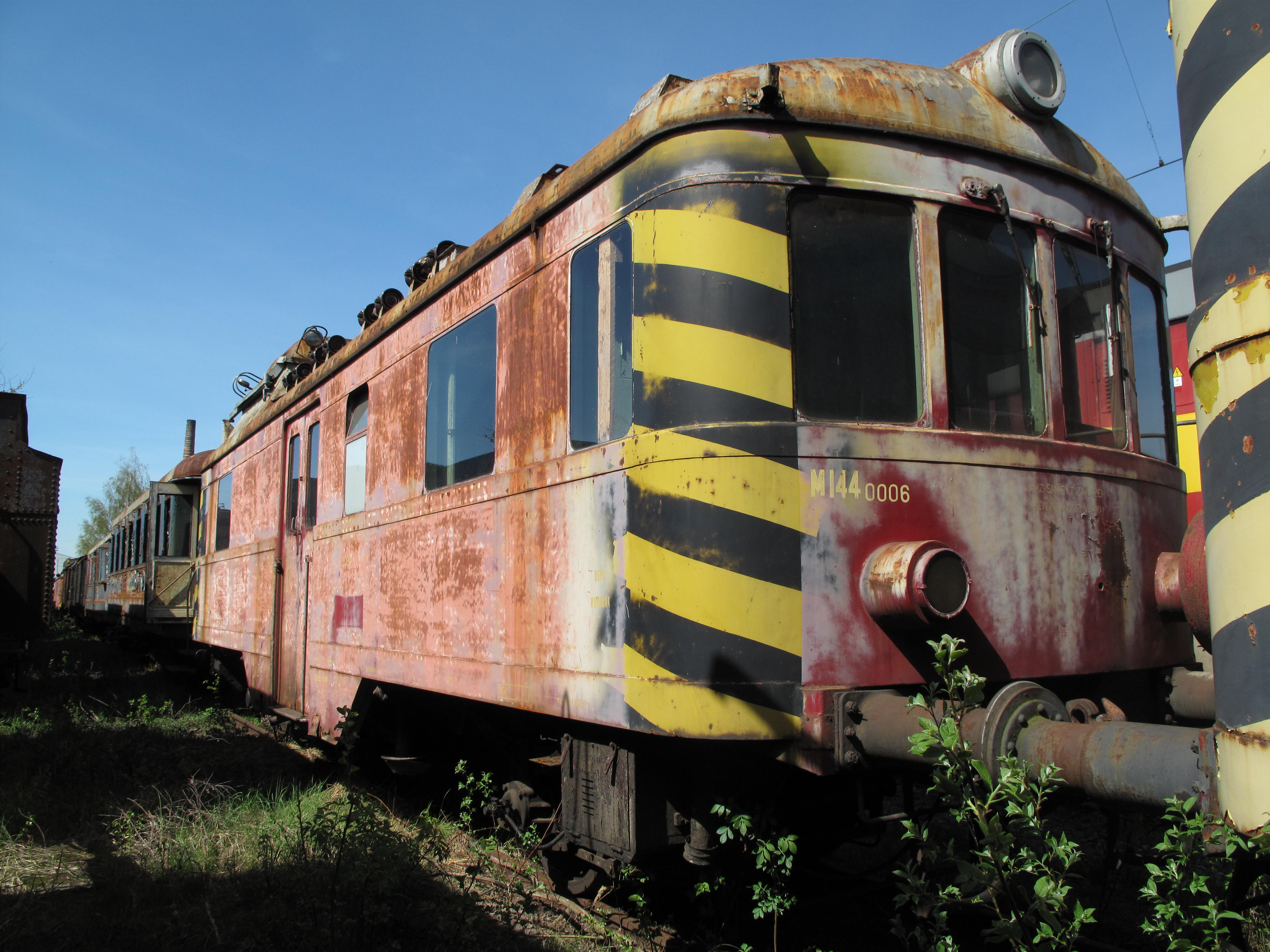 Železniční vozidla v České Třebové